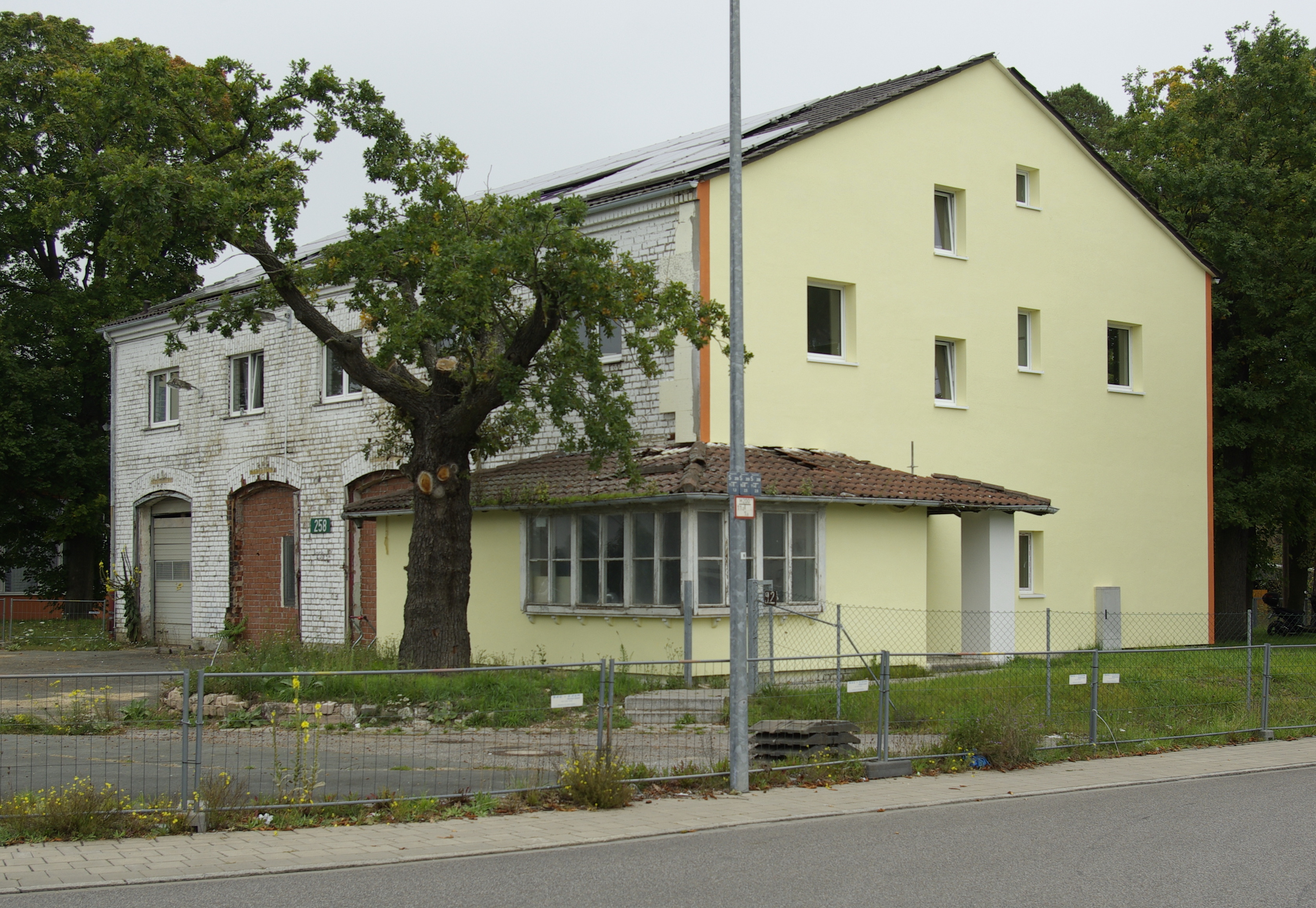 Ehemalige Feuerwehrstation (Gebäude Nr. 258) des ehemaligen Flughafens Nürnberg-Fürth in Fürth.